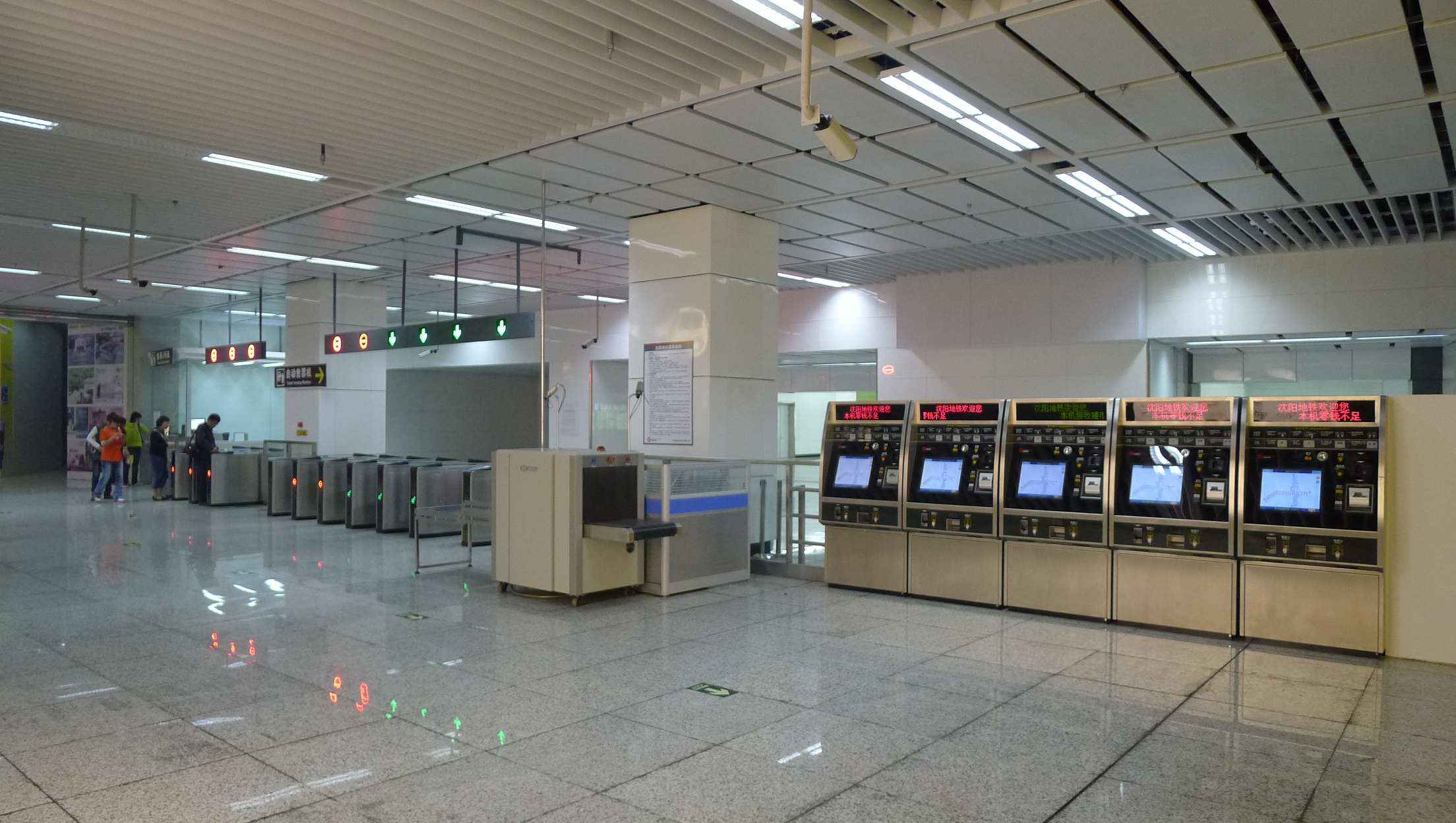 沈阳地铁滂江街站C出入口